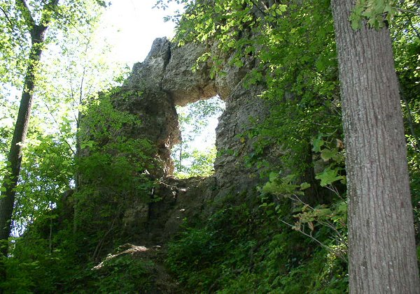 In-Yan-Teopa: Frontenac State Park, MN, USA